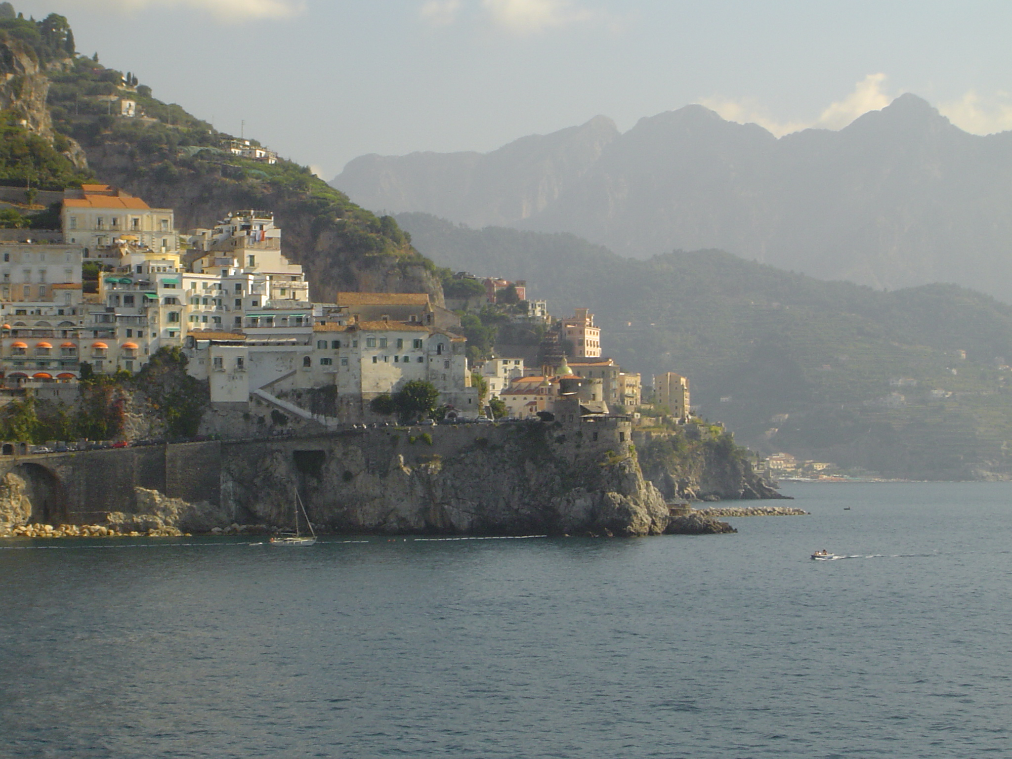 Amalfi vum Mier aus gesinn.